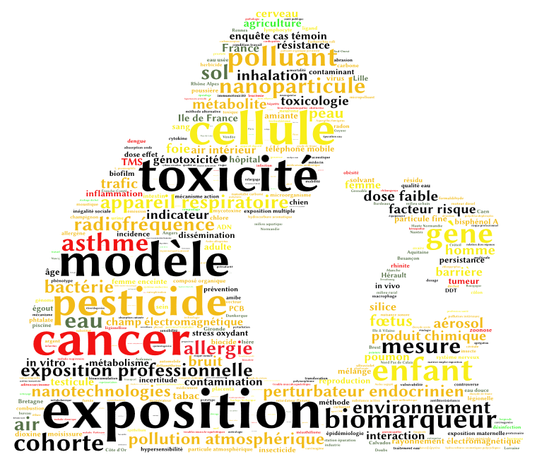 Les thématiques de la recherche en santé-environnement et santé au travail en France, de 2006 à 2016